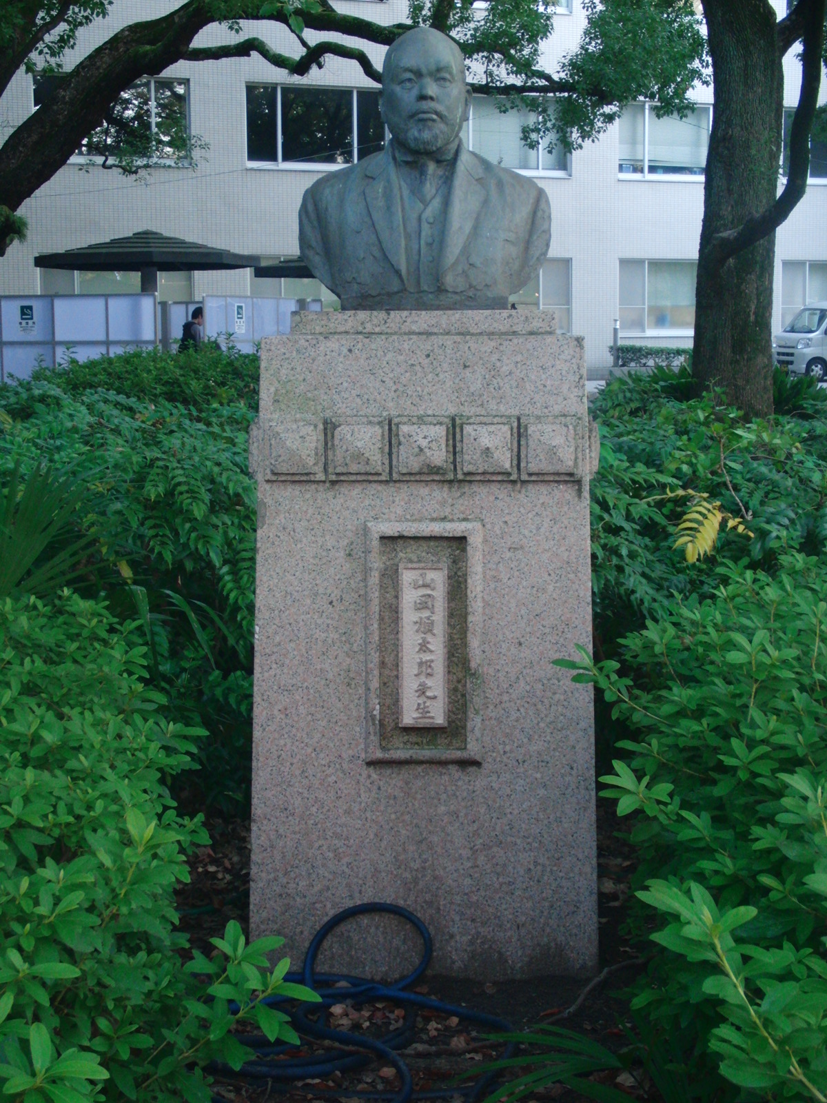 山岡順太郎の銅像（関西大学北千里キャンパスにて撮影）